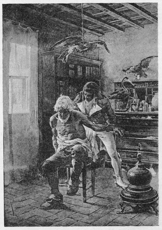 Eine chirurgische Operation